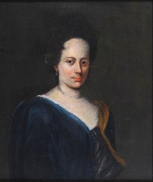 Porträt von Elisabeth Charlotte von Lehwaldt, verwitwete von Runkel, geborene von Seydel, der ersten Ehefrau des späteren preußischen Generalfeldmarschalls Johann (Hans) von Lehwaldt (* 24. Juni 1685 in Legitten, Landkreis Labiau; † 16. November 1768 in Königsberg), seit 4. Februar 1744 Ritters des Ordens vom Schwarzen Adler